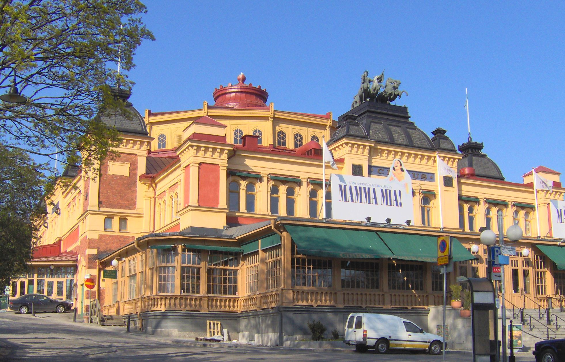 Cirkus, Stockholm, Sweden.